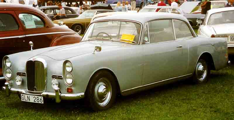 Alvis TE 21 Saloon 1965